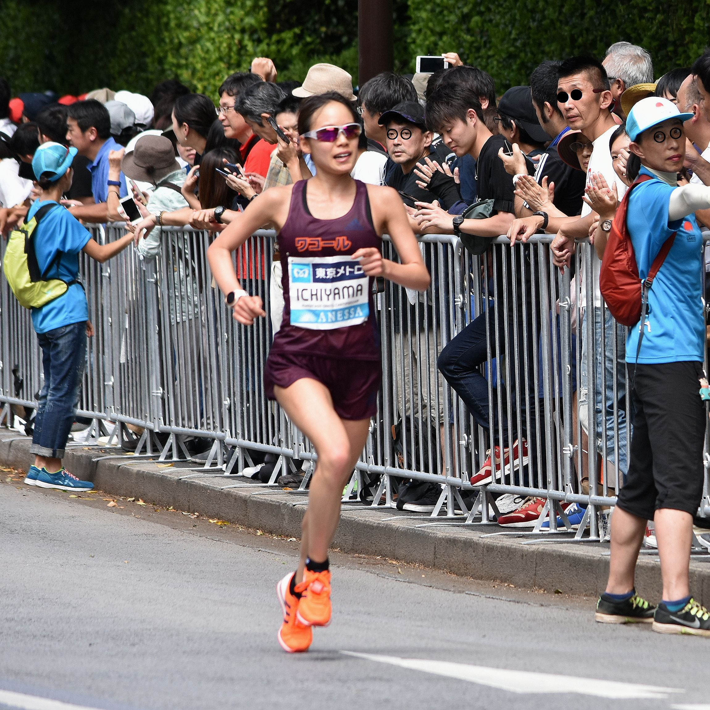 一山 麻緒